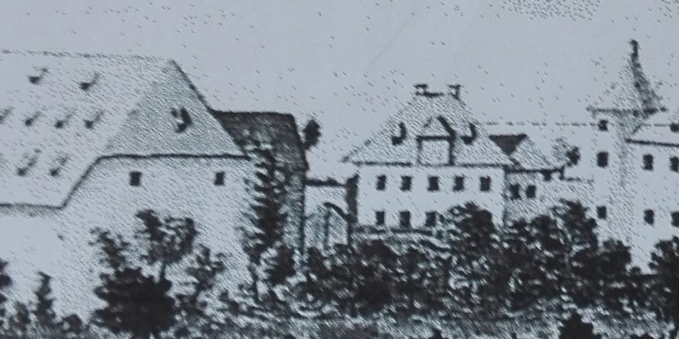 Westseite Pfarrhof Cronheim